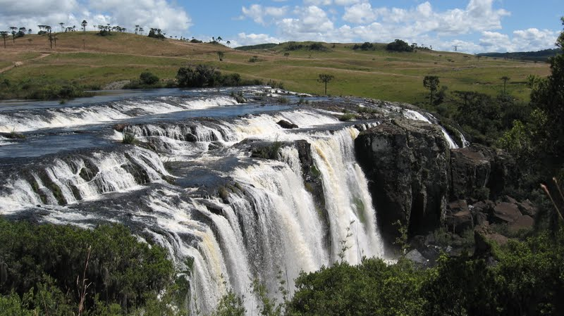 Cachoeira de 100m de altura, localizada no município de Jaquirana - RS